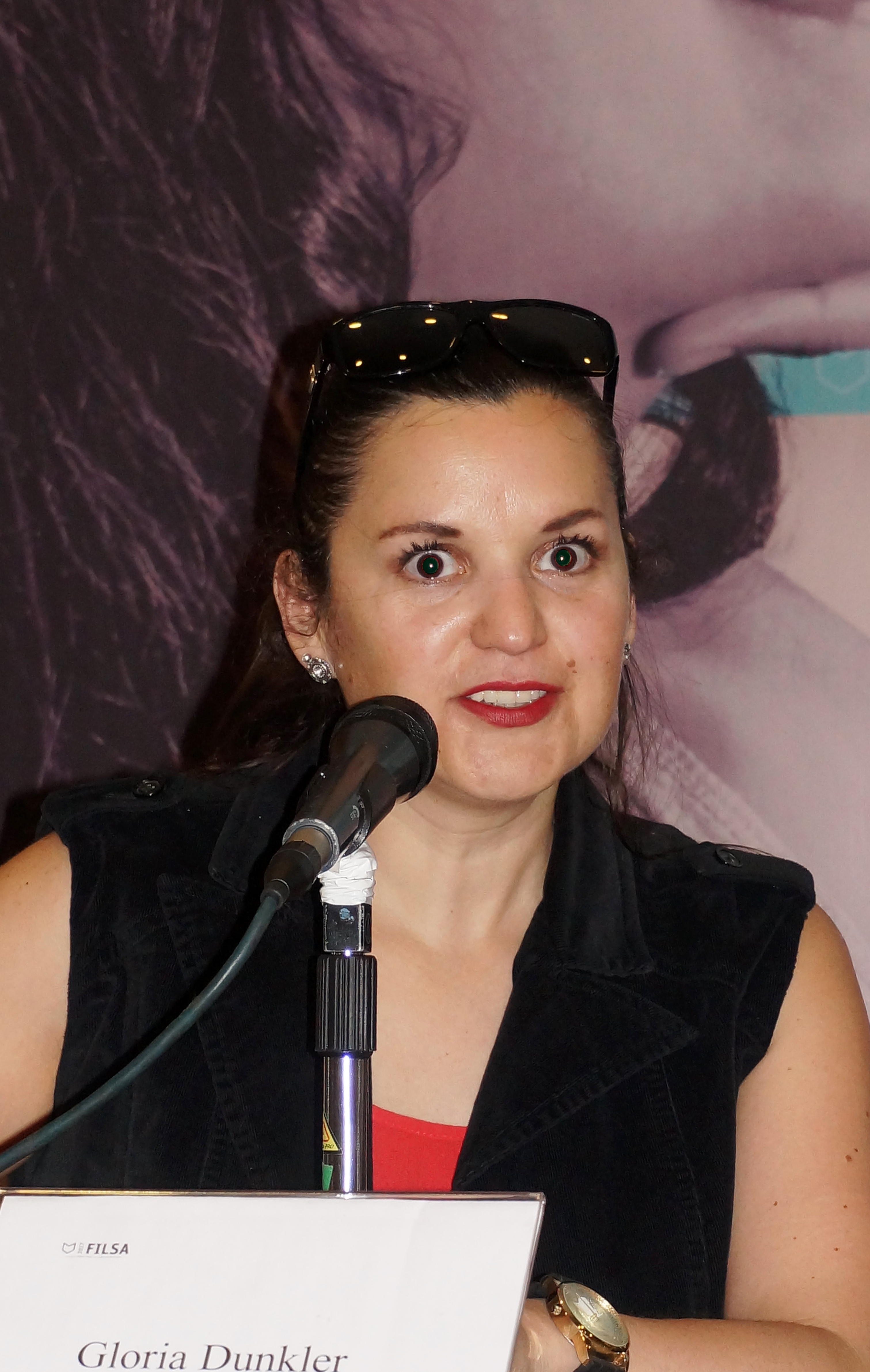 La poetisa chilena Gloria Dünkler en la Feria Internacional del Libro de Santiago 2017.